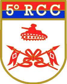 5º RCC - Símbolo da OM